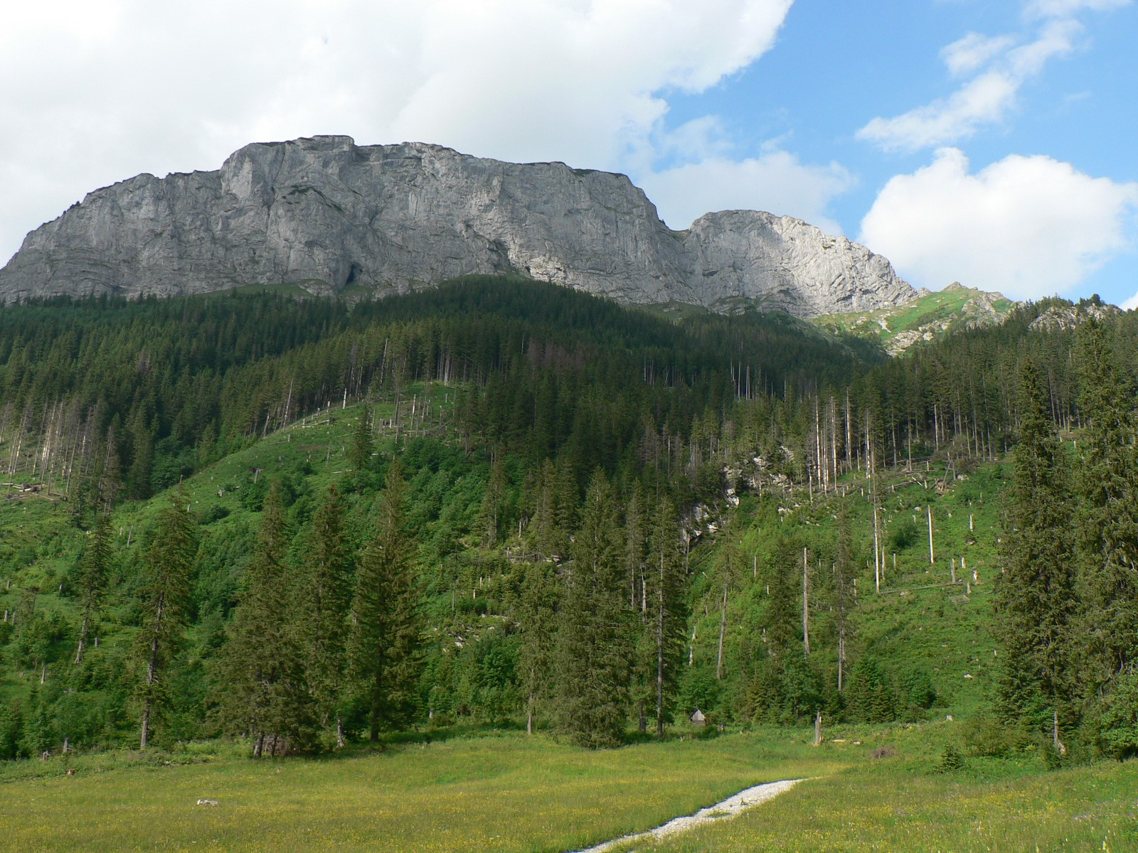 Murań z Polany pod Muraniem